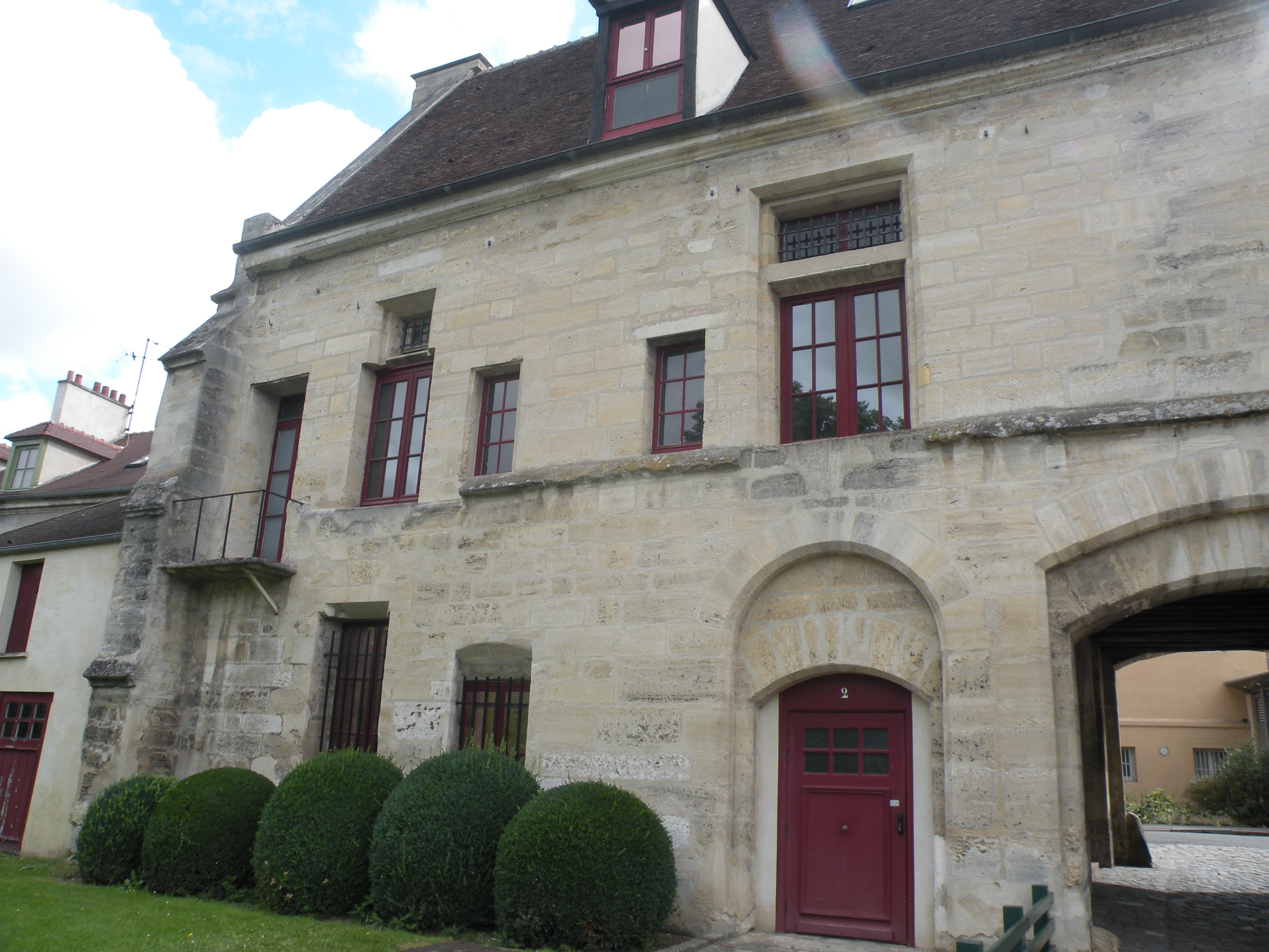 Prieuré Saint-Louis de Poissy